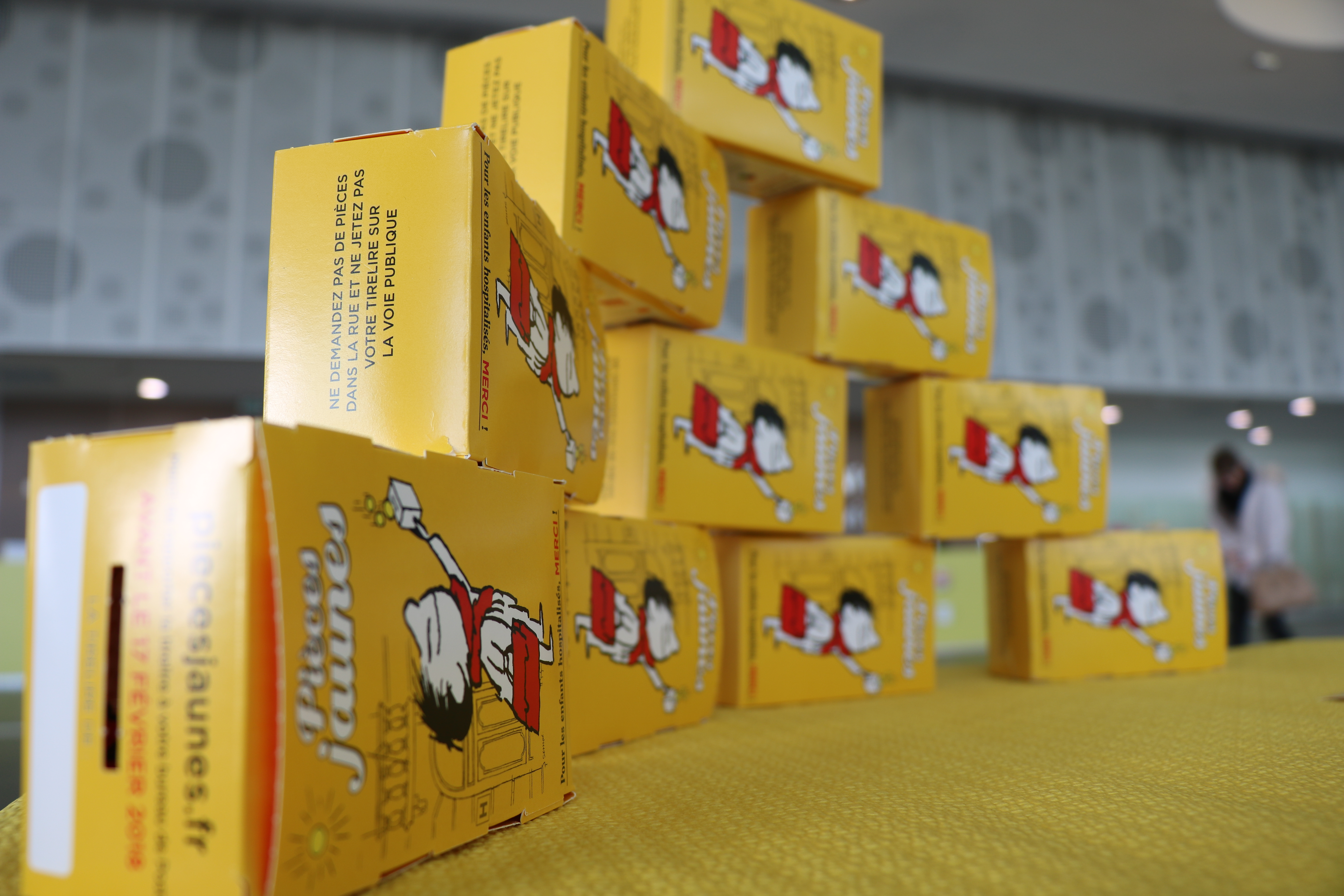 Tirelires Pièces Jaunes à l'occasion de la Journée Pièces Jaunes organisée le 16 février 2018 au centre hospitalier régional d'Orléans.